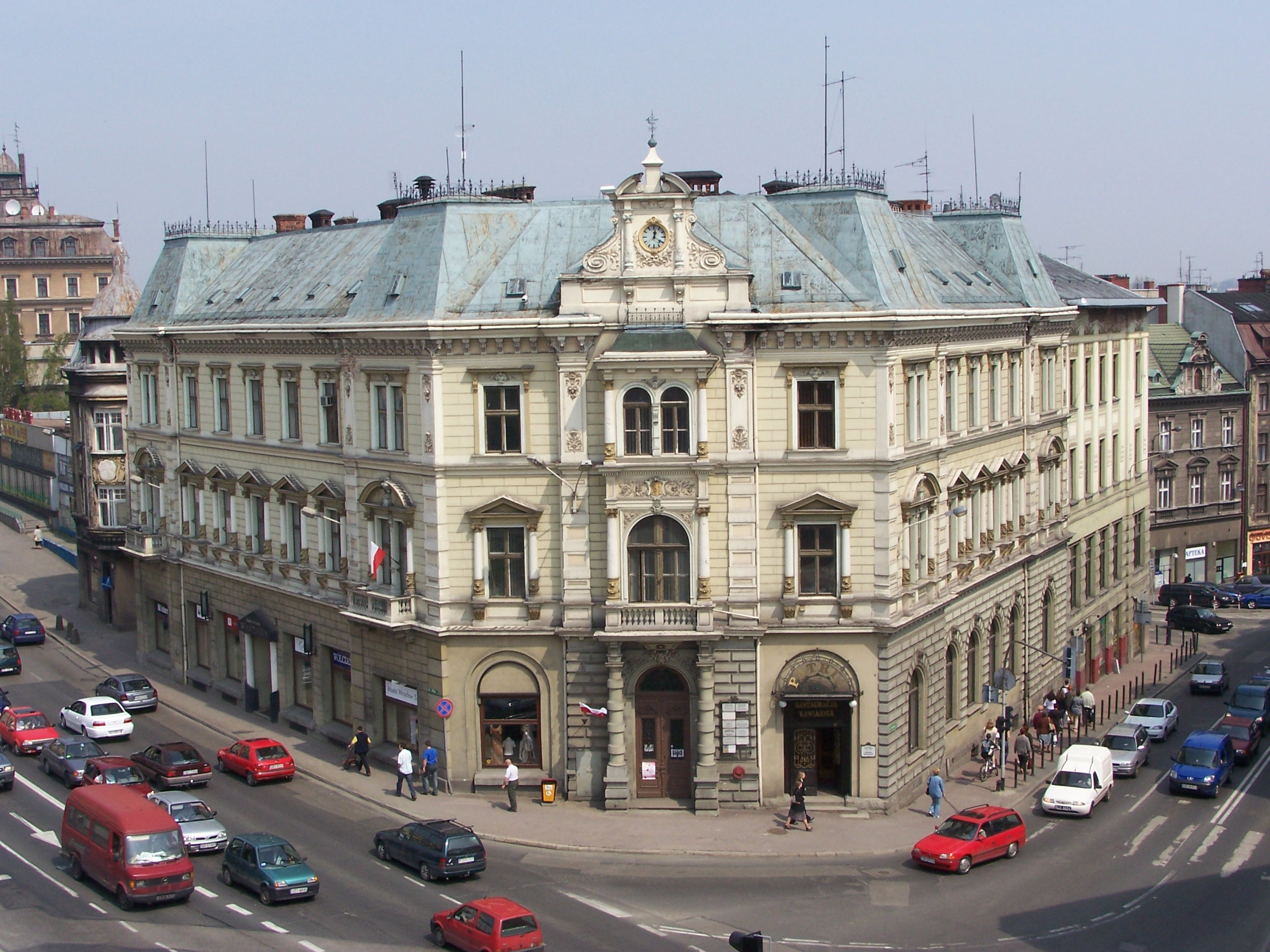 Kamienica narożna przy skrzyżowaniu ulic Zamkowej, 3.05.i Stojałowskiego w Bielsku-Białej.